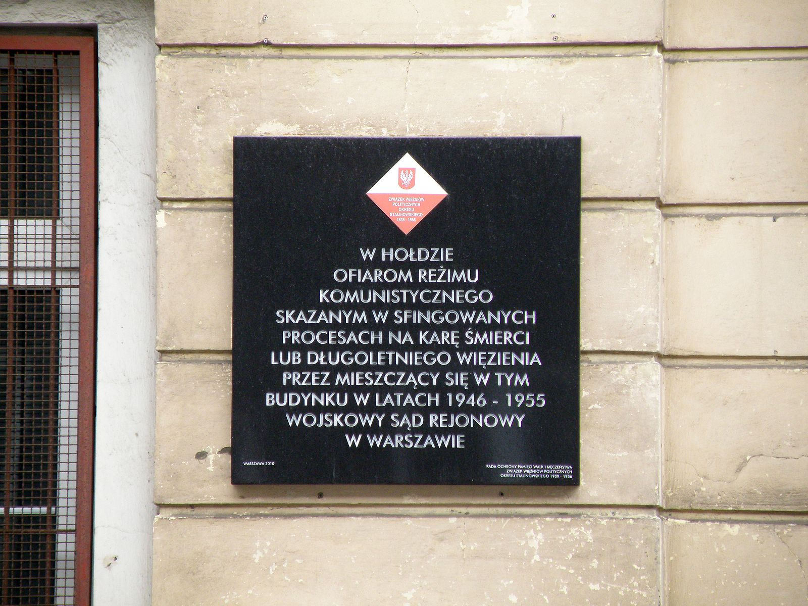 Tablica upamiętniająca działalność WSR w Warszawie, ul. Koszykowa 82